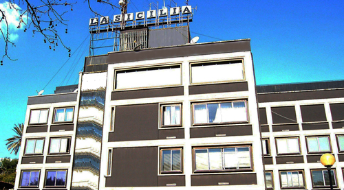 L'attuale sede del quotidiano La Sicilia in viale Odorico da Pordenone, a Catania (progetto dell'architetto Giacomo Leone)